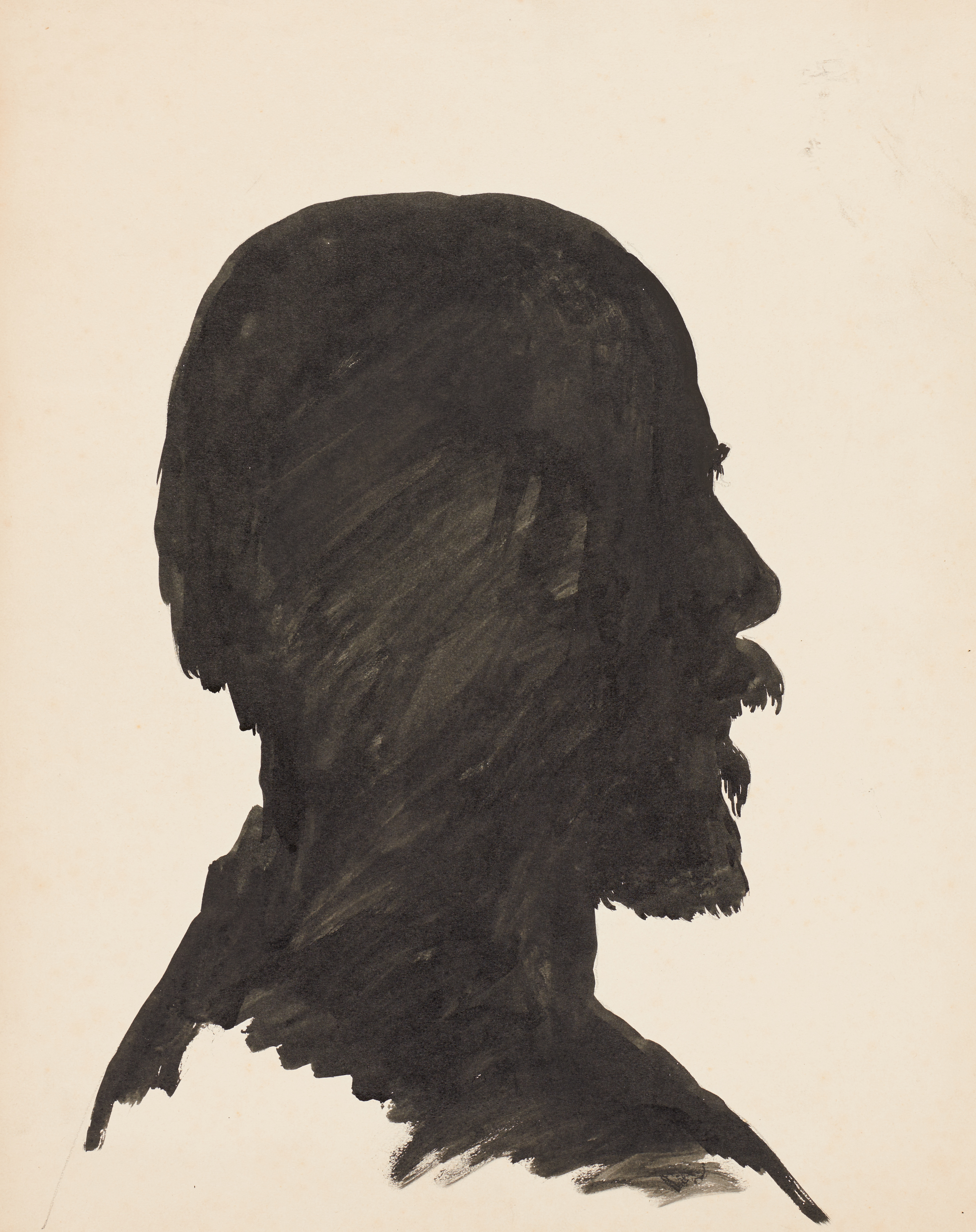 Schattenselbstbildnis im Profil nach rechts (Heinrich Schmidt-Pecht, o.J.); Bleistift, Tusche, Deckweiß auf Papier; 49,5 x 40 cm; Städtische Wessenberg-Galerie Konstanz, Nachlass Heinrich Schmidt-Pecht